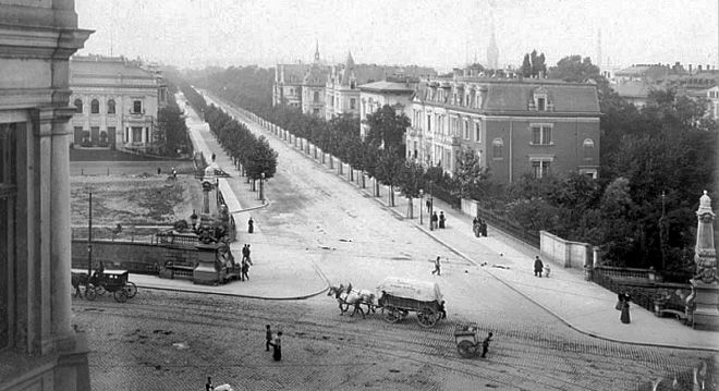 Leipzig, Karl-Tauchnitz-Straße an der Karl-Tauchnitz-Brücke, Kreuzung Harkortstraße Martin-Luther-Ring, gegenüber der Pleißenburg (heute Neues Rathaus) um 1900